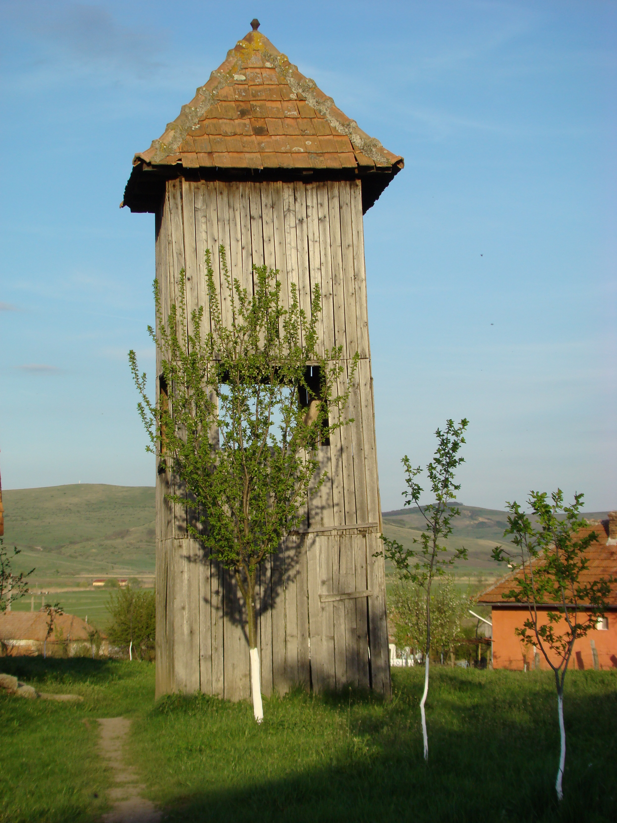 Biserica de lemn din Tău